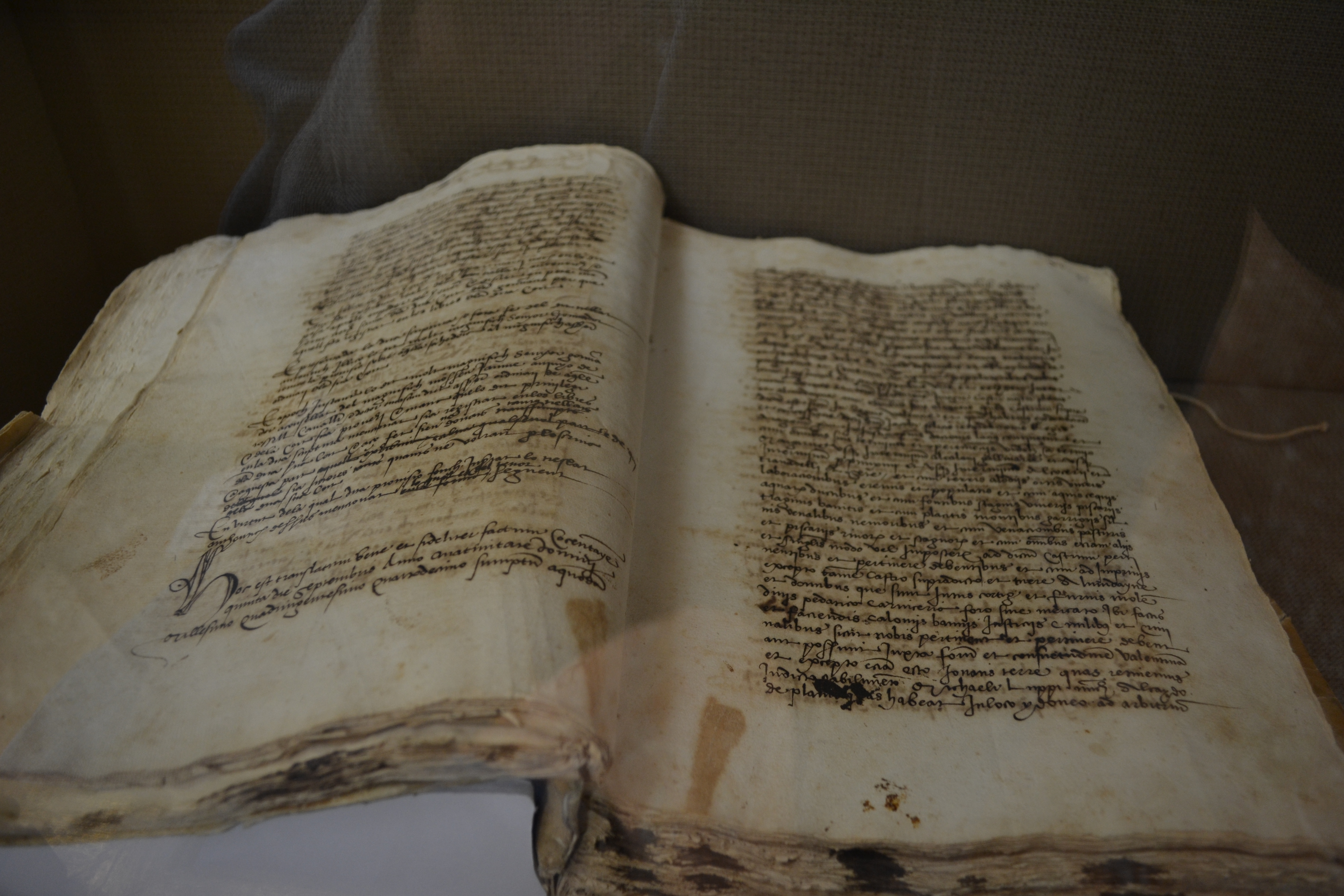 Na Teresa Gil de Vidaure i el seu fill Jaume de Jèrica atorguen carta pobla al castell de Planes i la torre d'Almudaina, per a 150 repobladors cristians i a fur de València (10 de juny de 1278). ARV: Governació, llibre 2412, mà 12, fol. 59 (còpia de 5 de setembre de 1414). Arxiu del Regne de València.